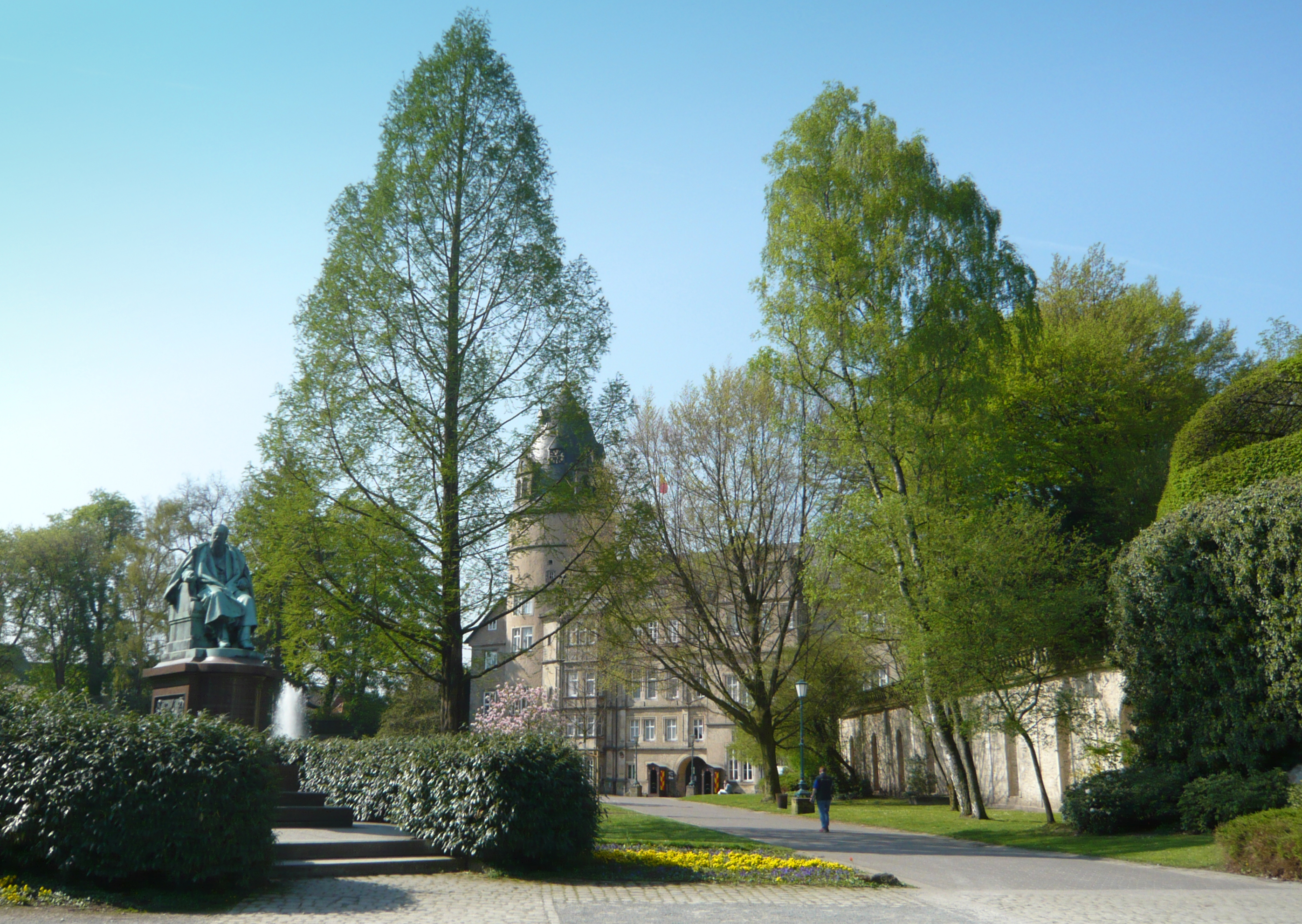 Der Schlossplatz in Detmold, Kreis Lippe, Nordrhein-Westfalen. Im Hintergrund das fürstliche Residenzschloss. Das Bronzedenkmal im Vordergrund links erinnert an den lippischen Grafregenten Ernst zur Lippe-Biesterfeld.